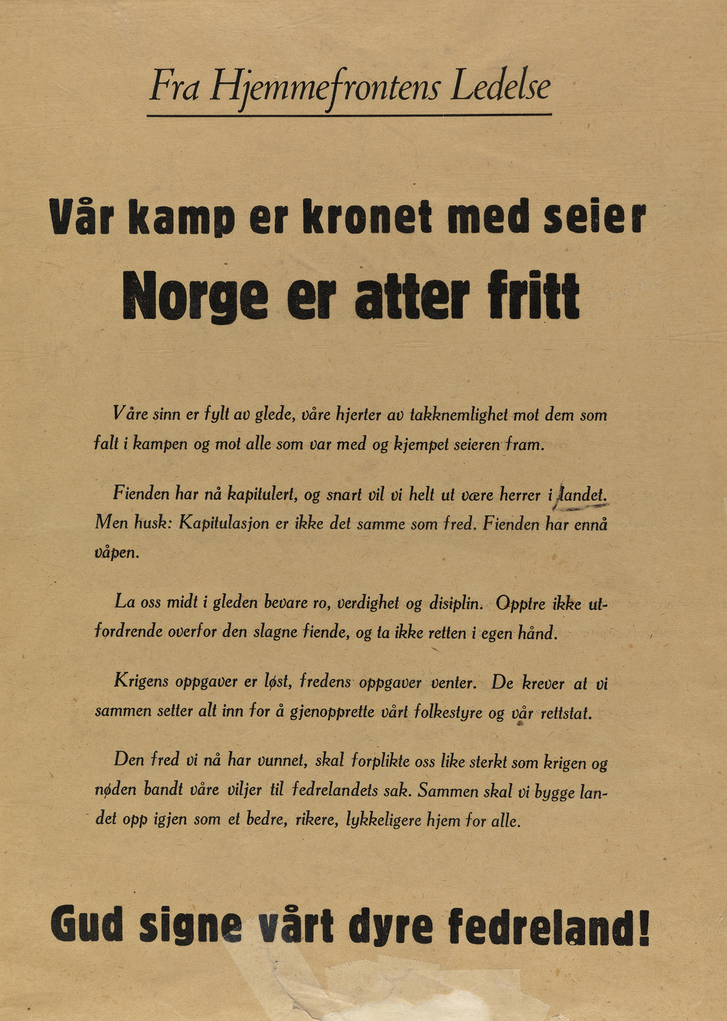 Bildet er hentet fra Nasjonalbibliotekets plakatsamling